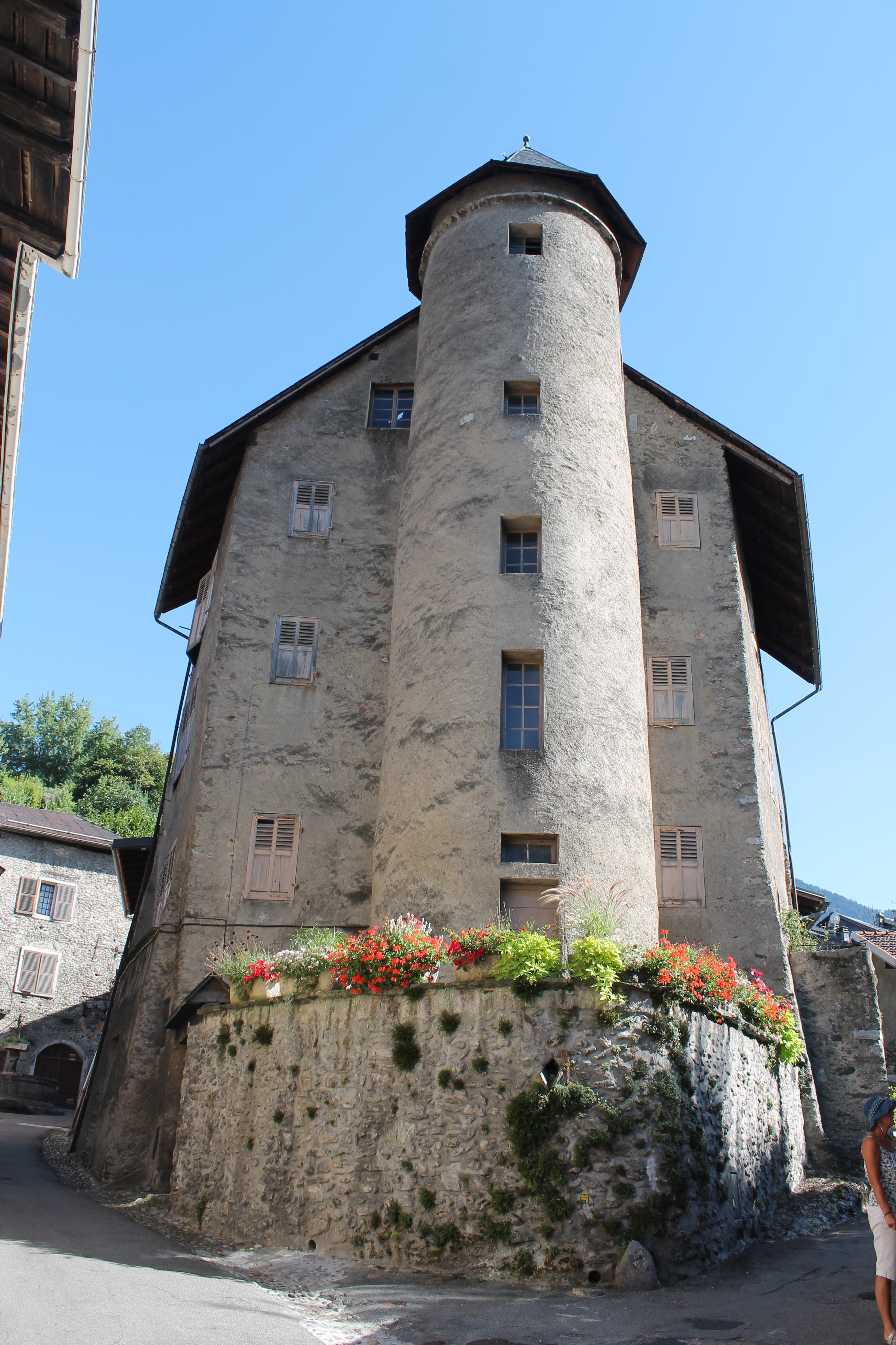 Tour Ramus depuis la porte de Savoie, à Conflans